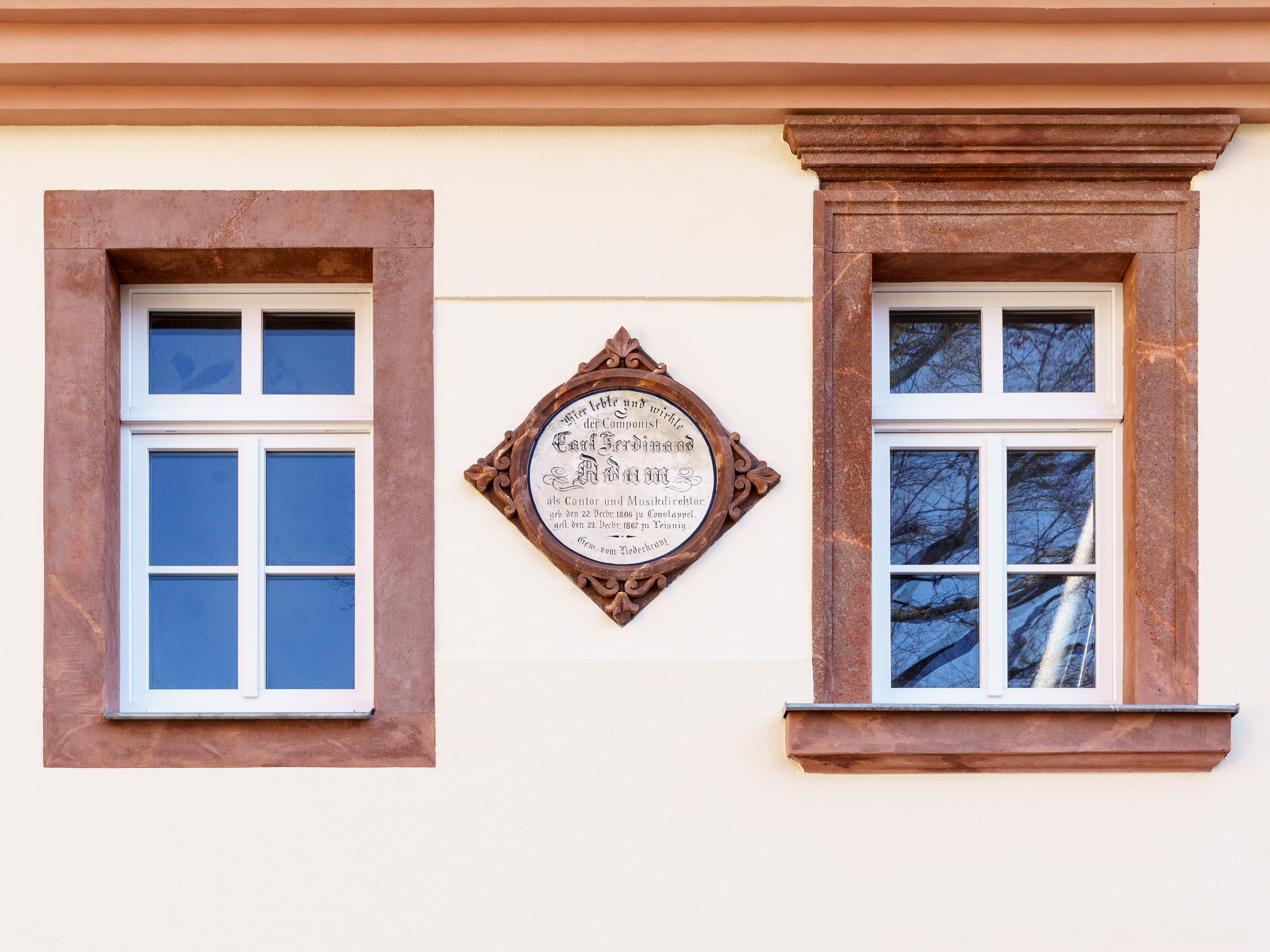 Gedenktafel an den Componisten Carl Ferdinand Adam Cantor und Musikdirektor zu Leisnig am Gebäude Kirchplatz 4 in Leisnig